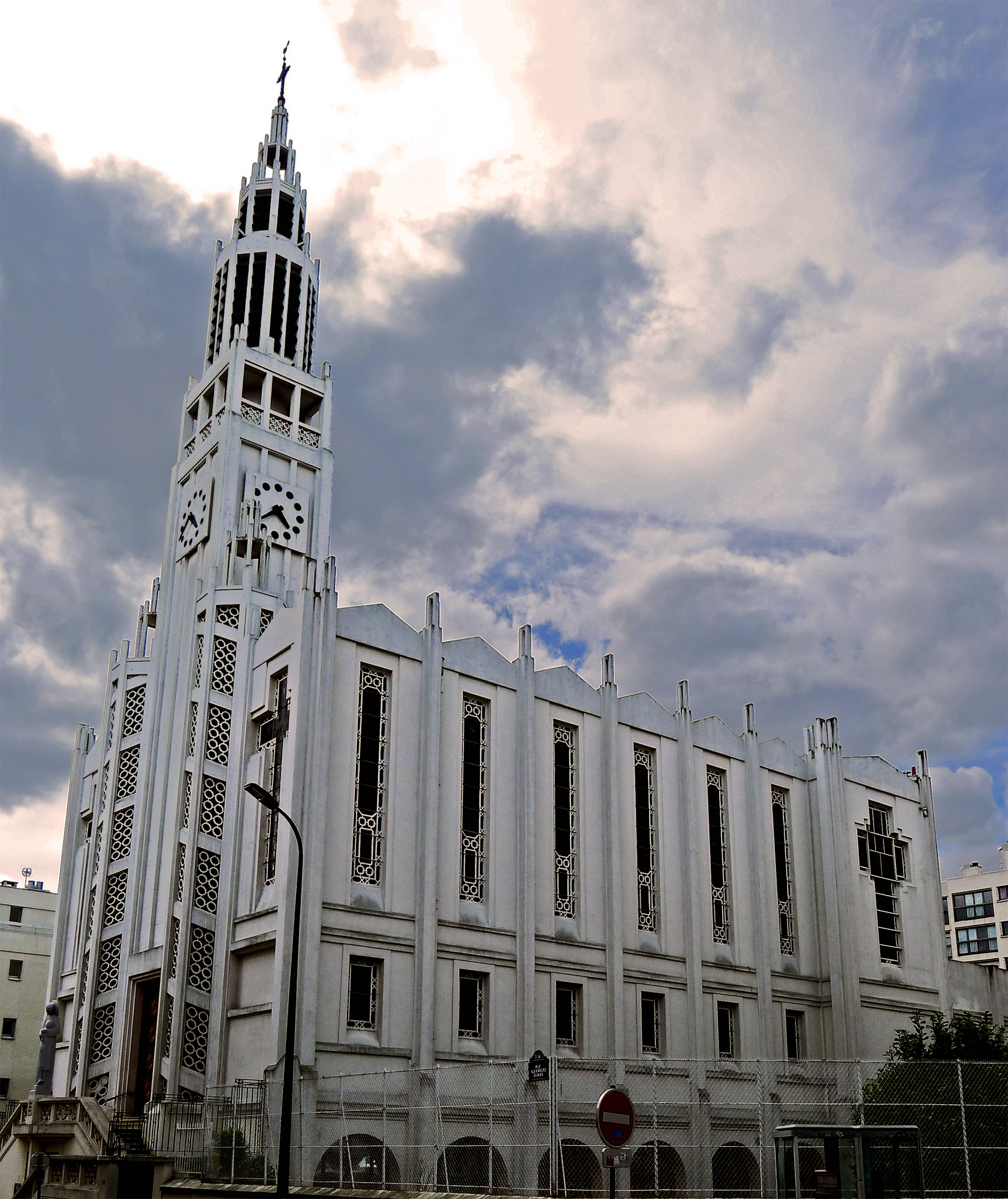 Église Saint-Jean-Bosco (Inscrit) n° 77,79 rue Alexandre-Dumas - Paris XX .